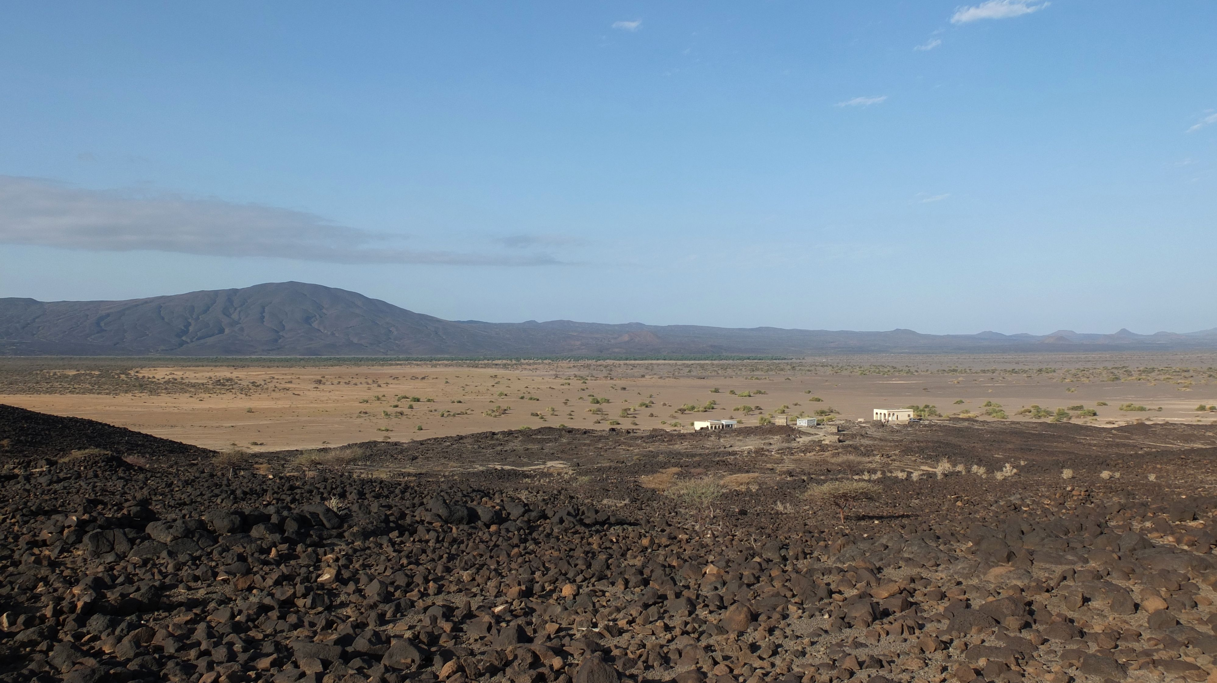 L'Ecole de Mouddo, face à la plaine d'Andaba